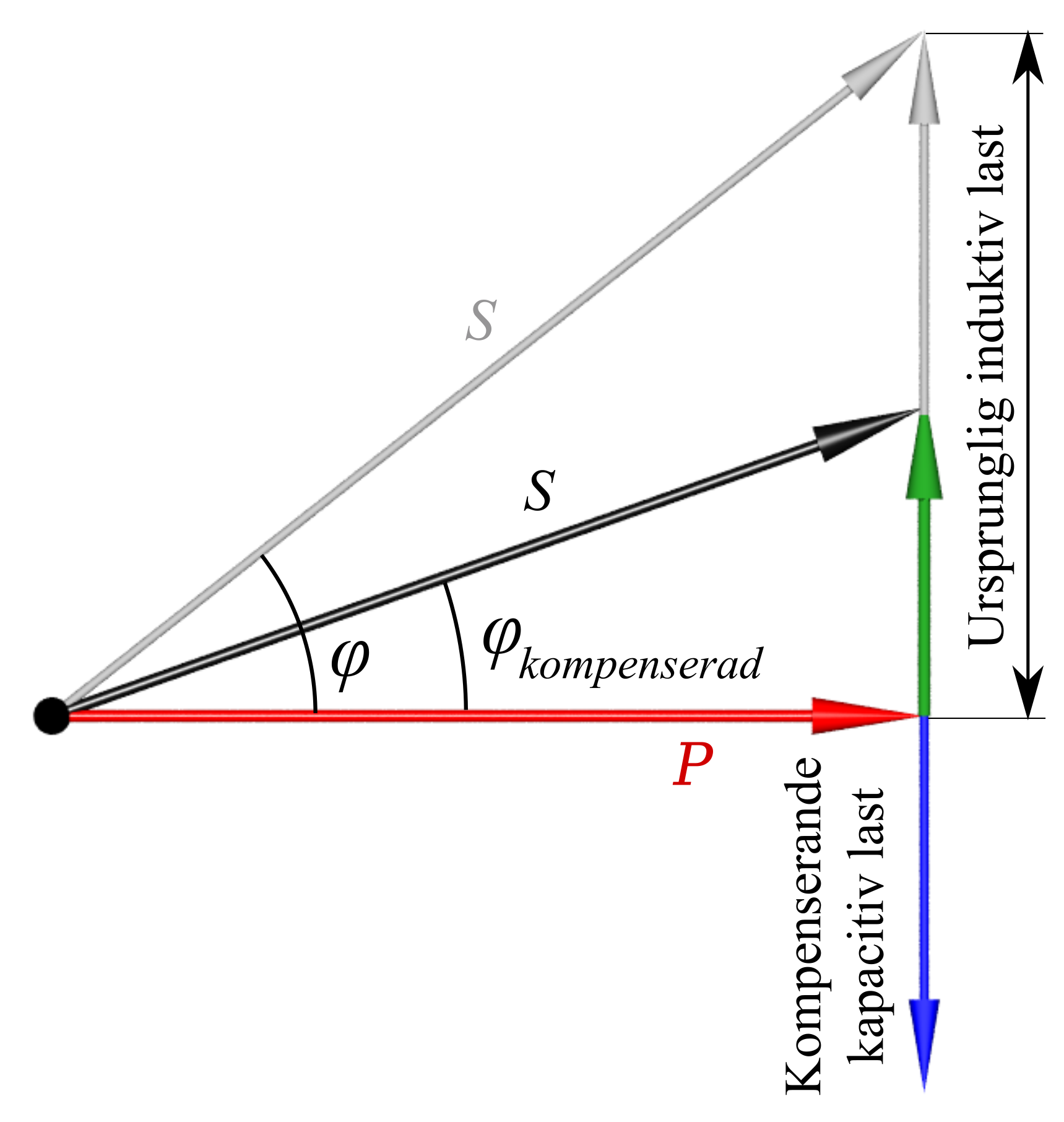 Faskompensering